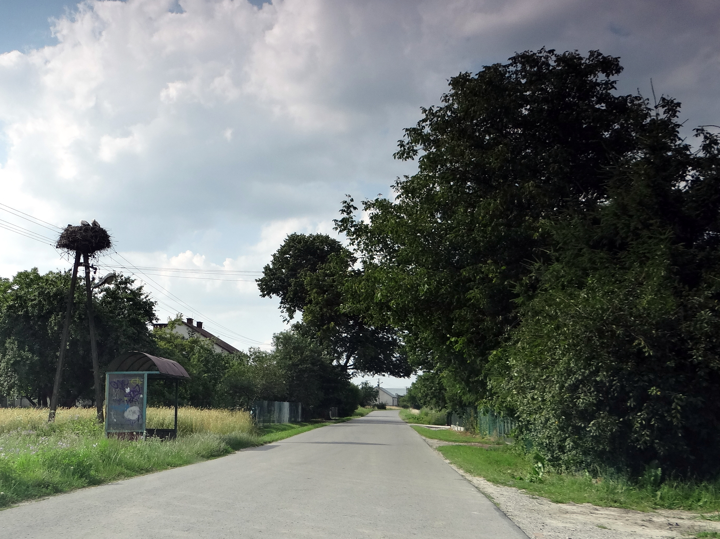 Bocianie gniazdo w miejscowości Koziarnia.